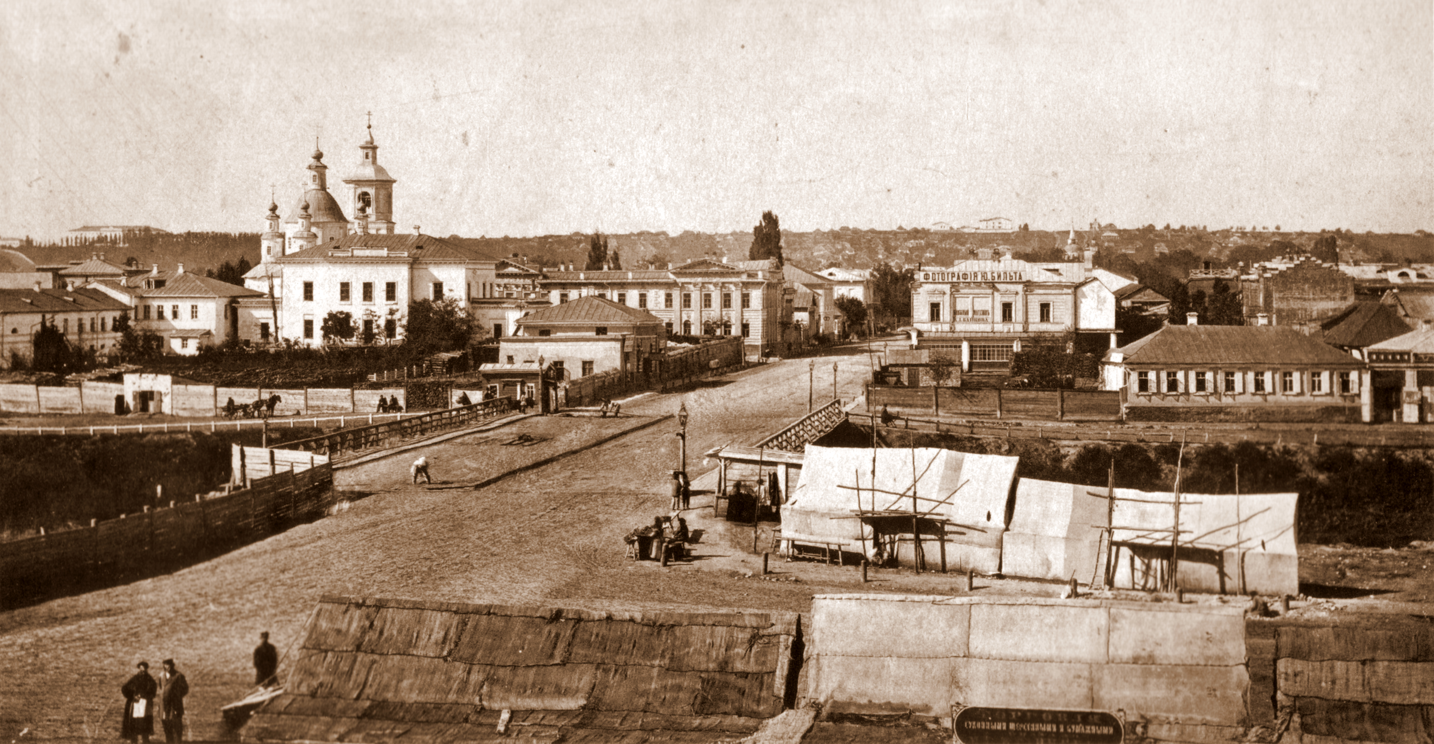 Вид с Университетской горки через участок Сергиевской площади на Лопанский мост, Екатеринославскую улицу и Христорождественскую церковь.